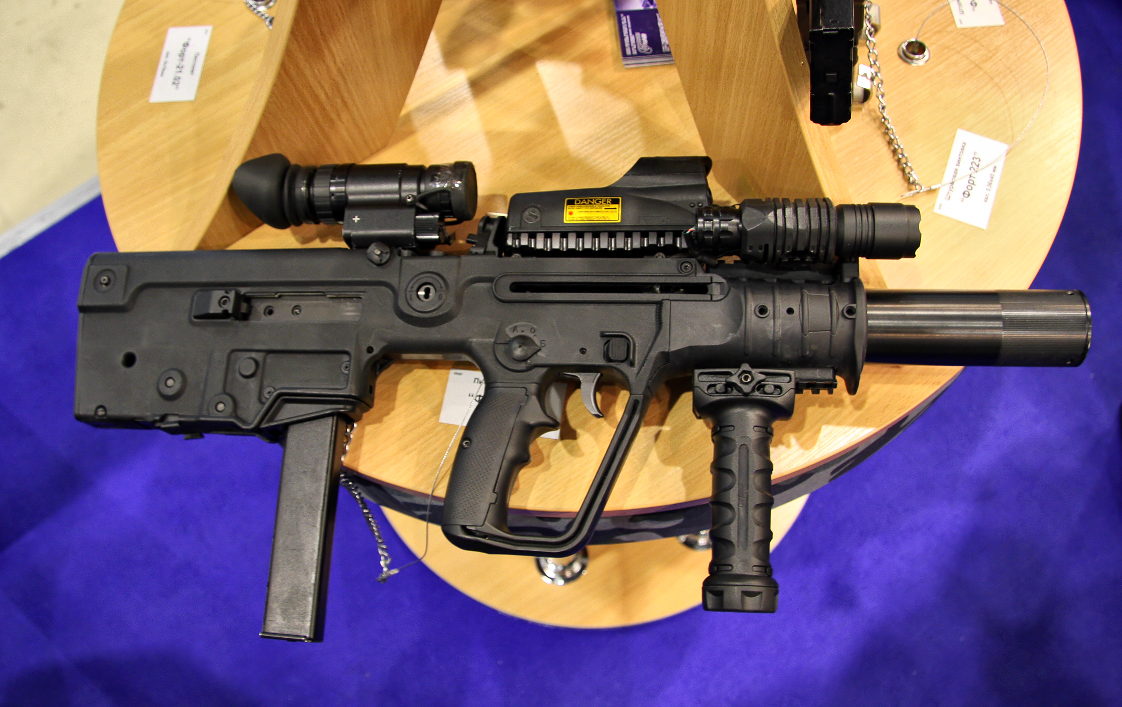 Форт 224 (Fort 224)